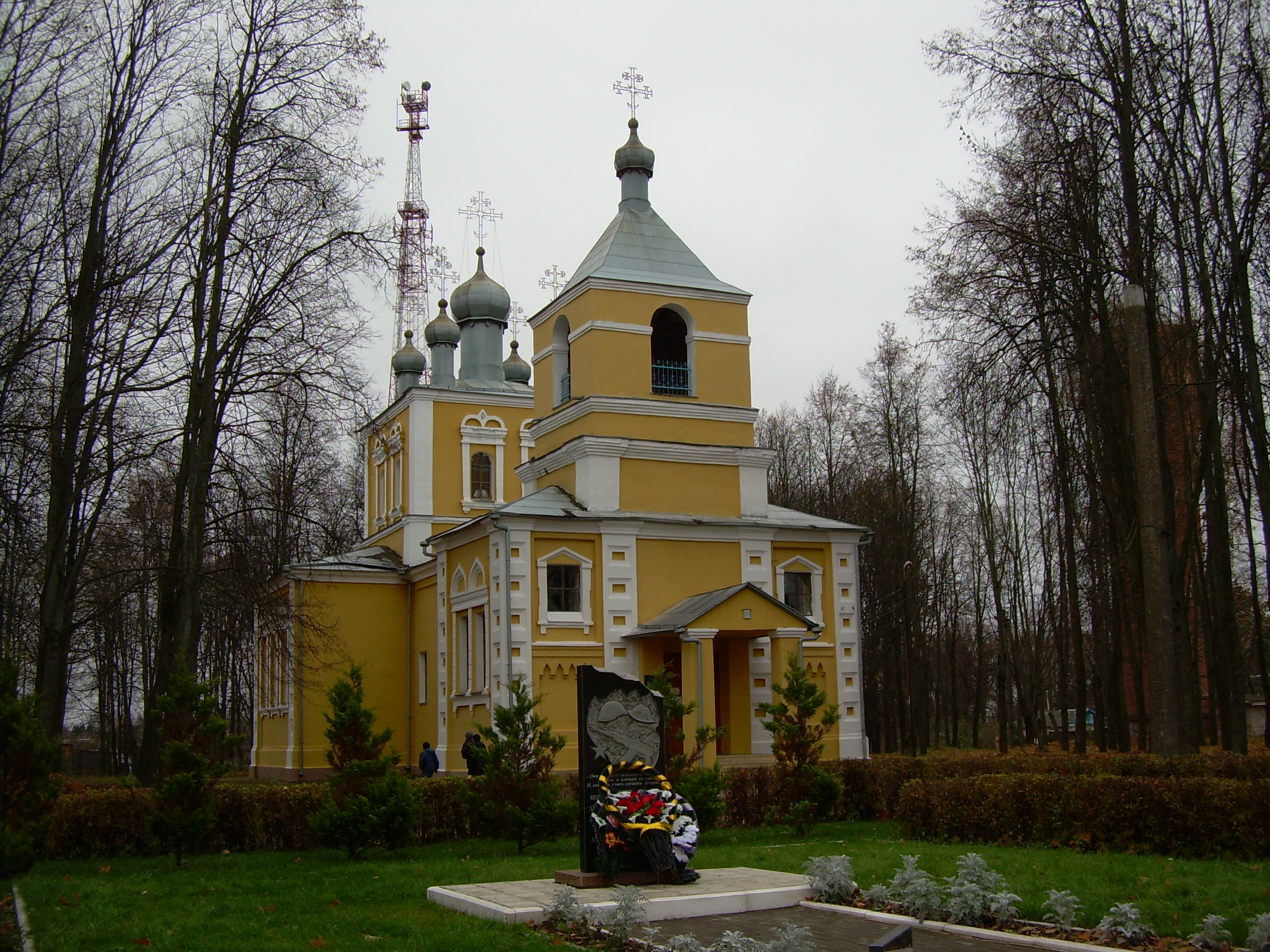 Церковь в посёлке Монастырщина